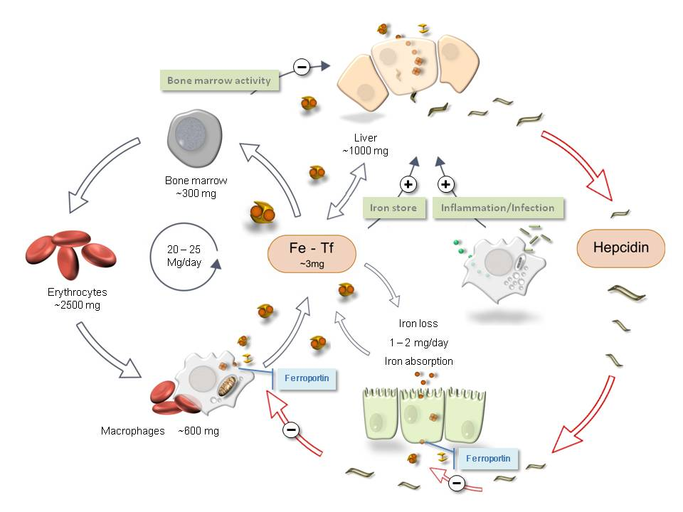 Plek hepcidine binnen ijzerhomeostase